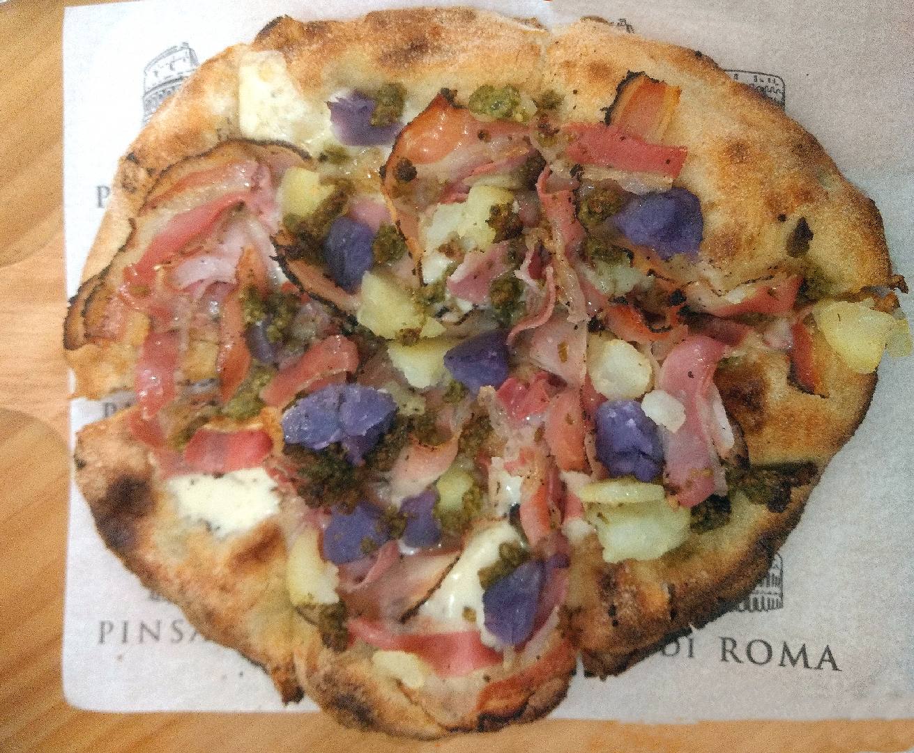 Pinsa Liguria a un restaurant italià de València. Mozzarella, pancetta, creïlla i pesto